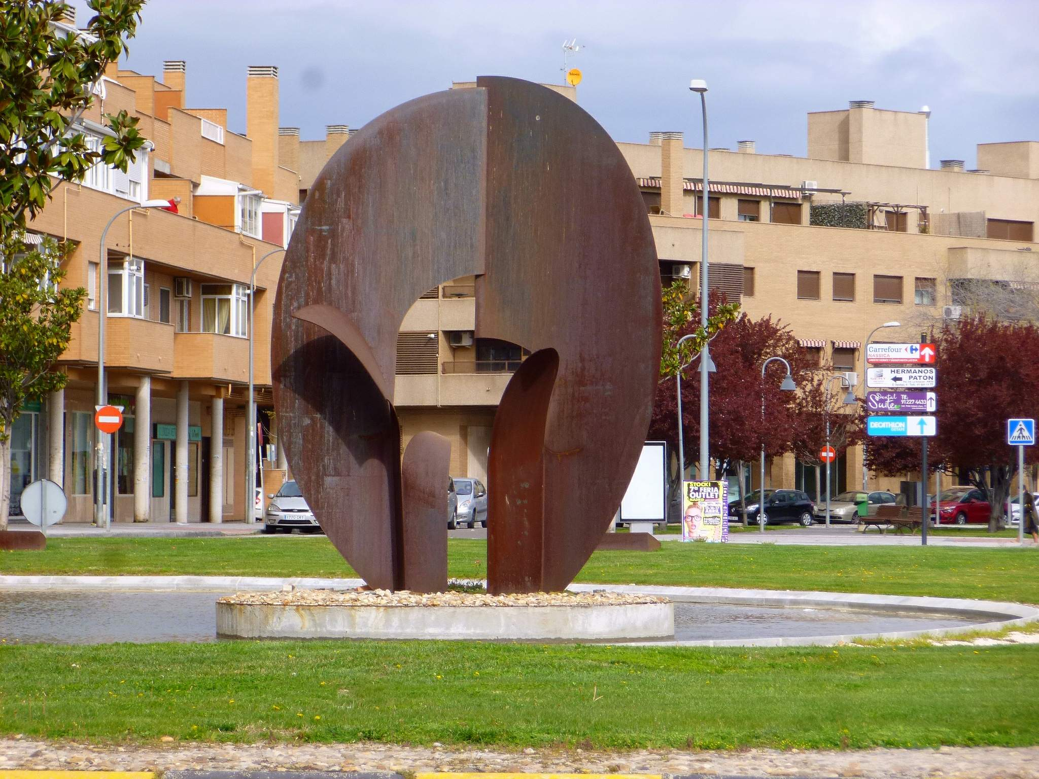 Glorieta Víctimas del Terrorismo (Pinto, Madrid)